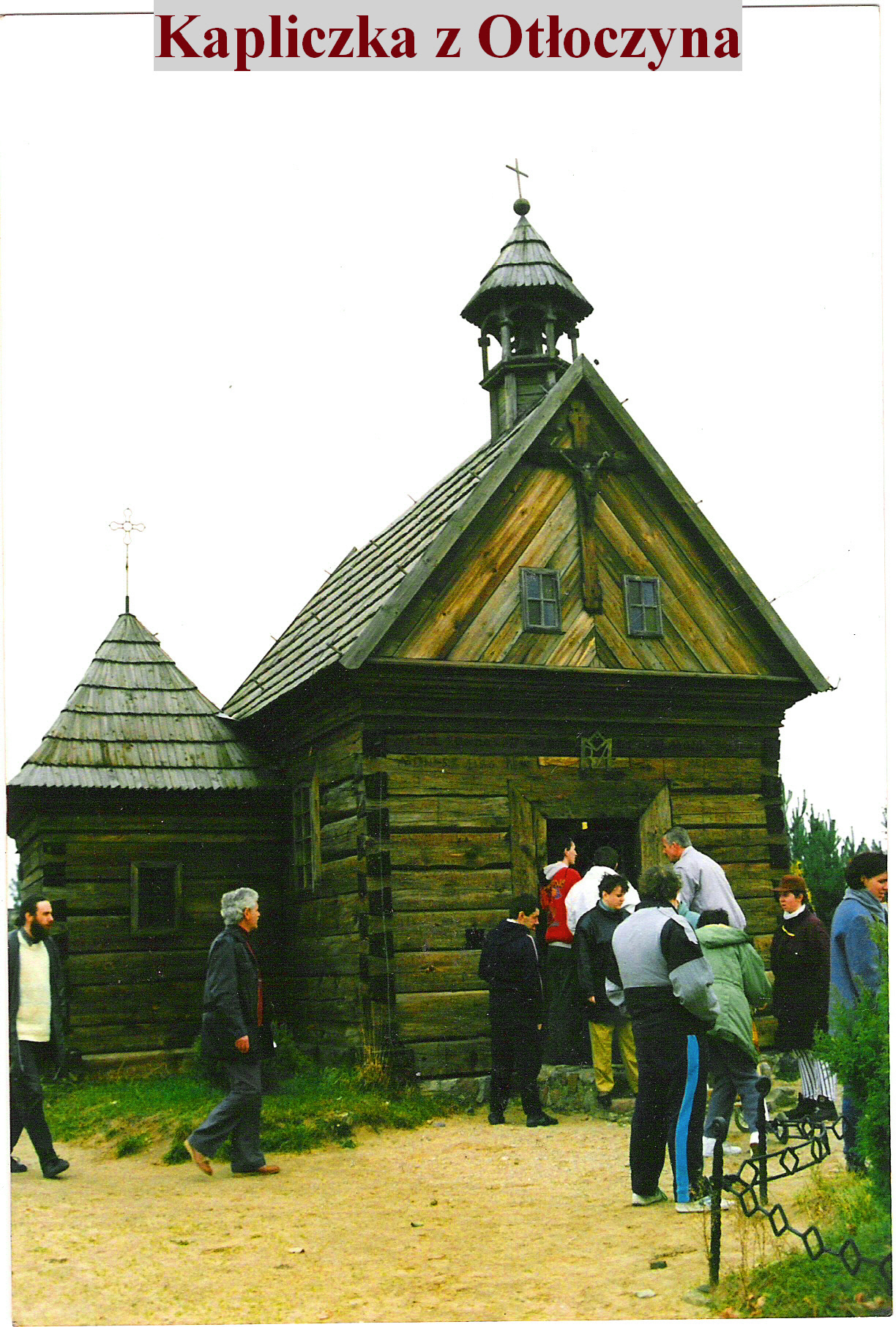 Kaplica Otłoczyńska przeniesiona do Wielkopolskiego Parku Etnograficznego fotografowana 28.10.1994r. autor Jacek Krzyżyński